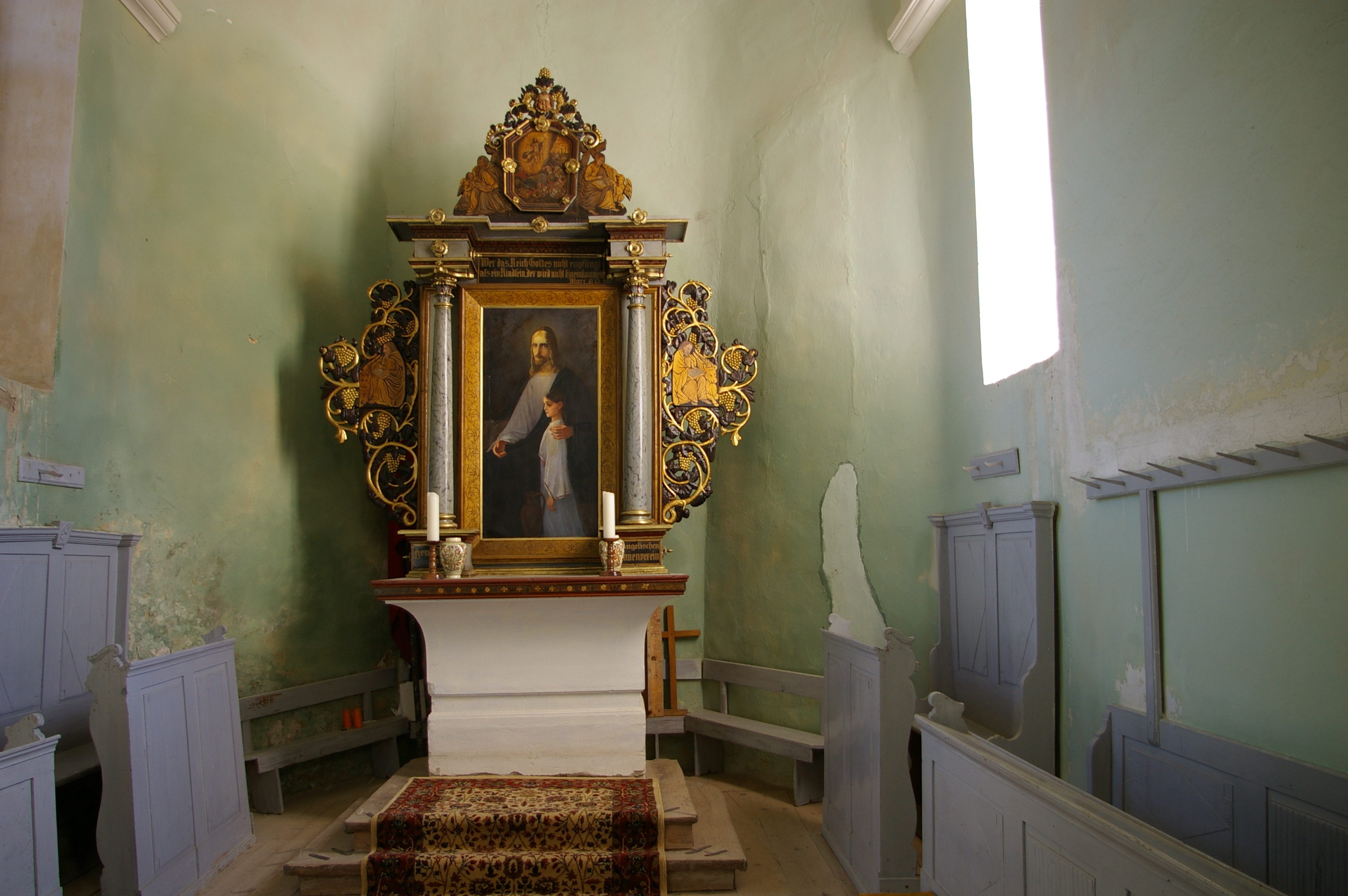 Chor und Altar in Seligstadt